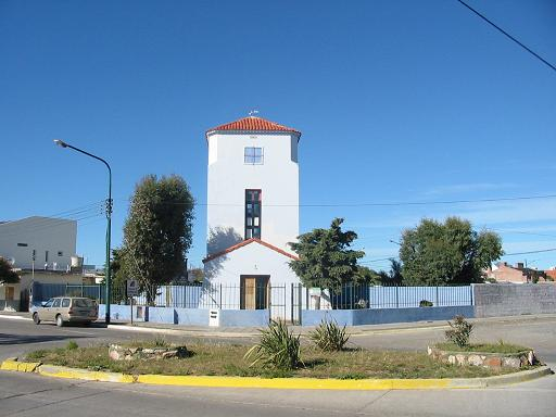 Estación de Fotobiología Playa Unión (año 2003)